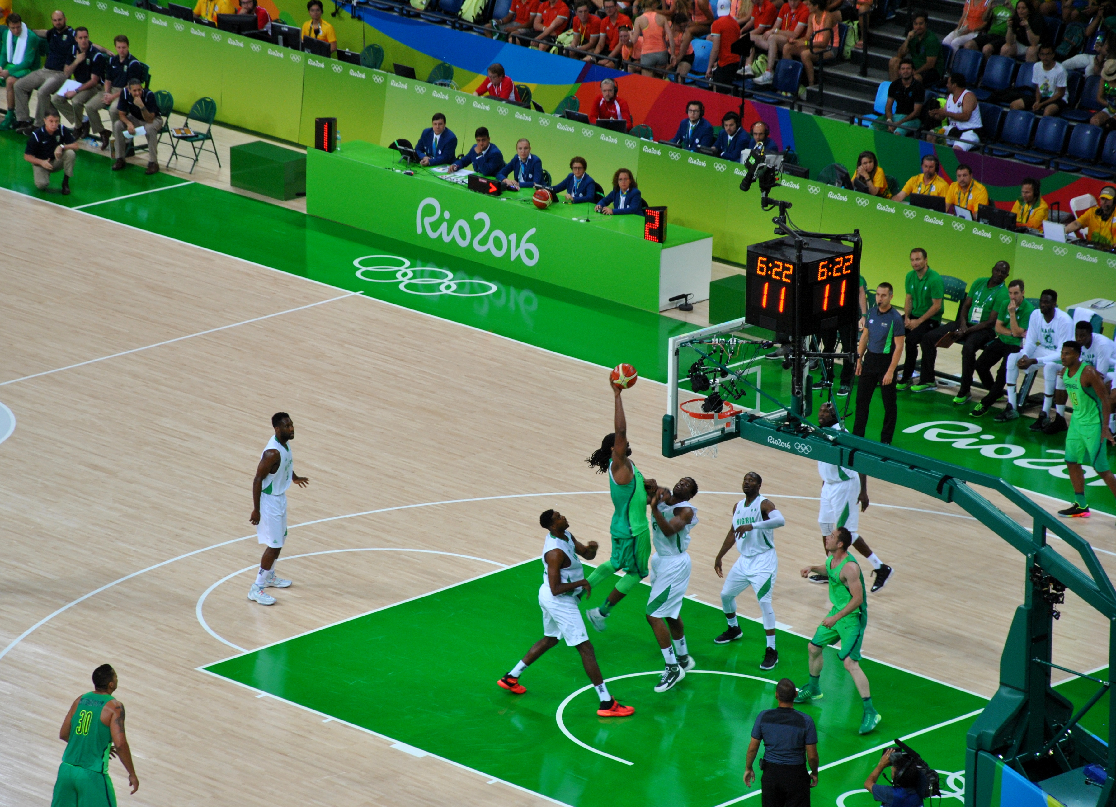 Brasil 86 Vs. 69 Nigeria. Arena Carioca 1. Parque Olímpico da Barra. Rio 2016